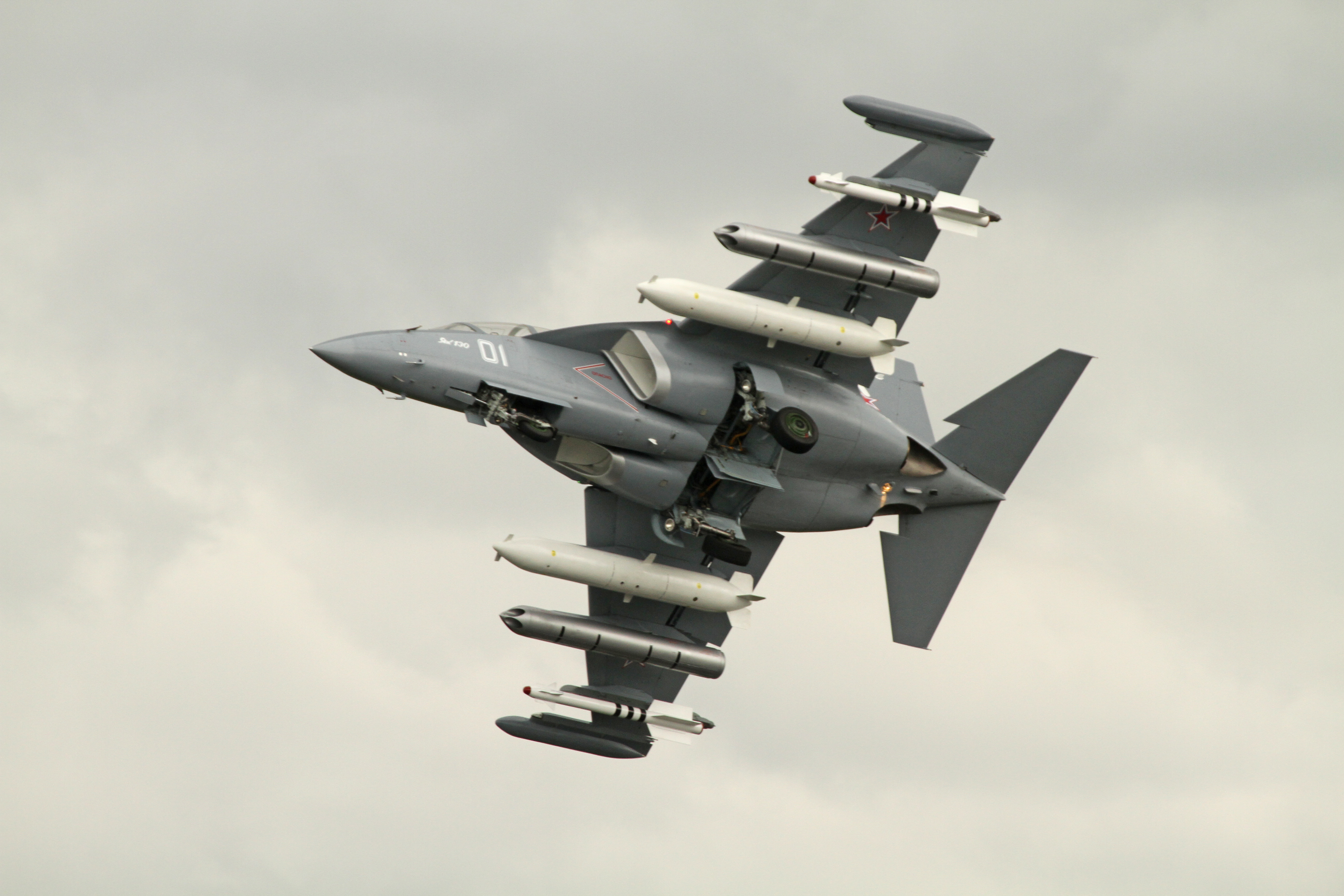 Yakovlev Yak-130 - FIAR 2012